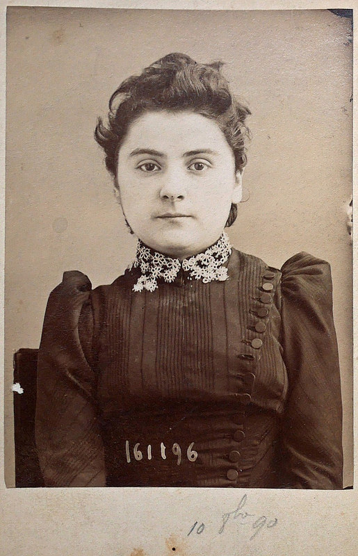 Gabrielle Bompard, maîtresse de Michel Eyraud, assassin de l’huissier Gouffé.